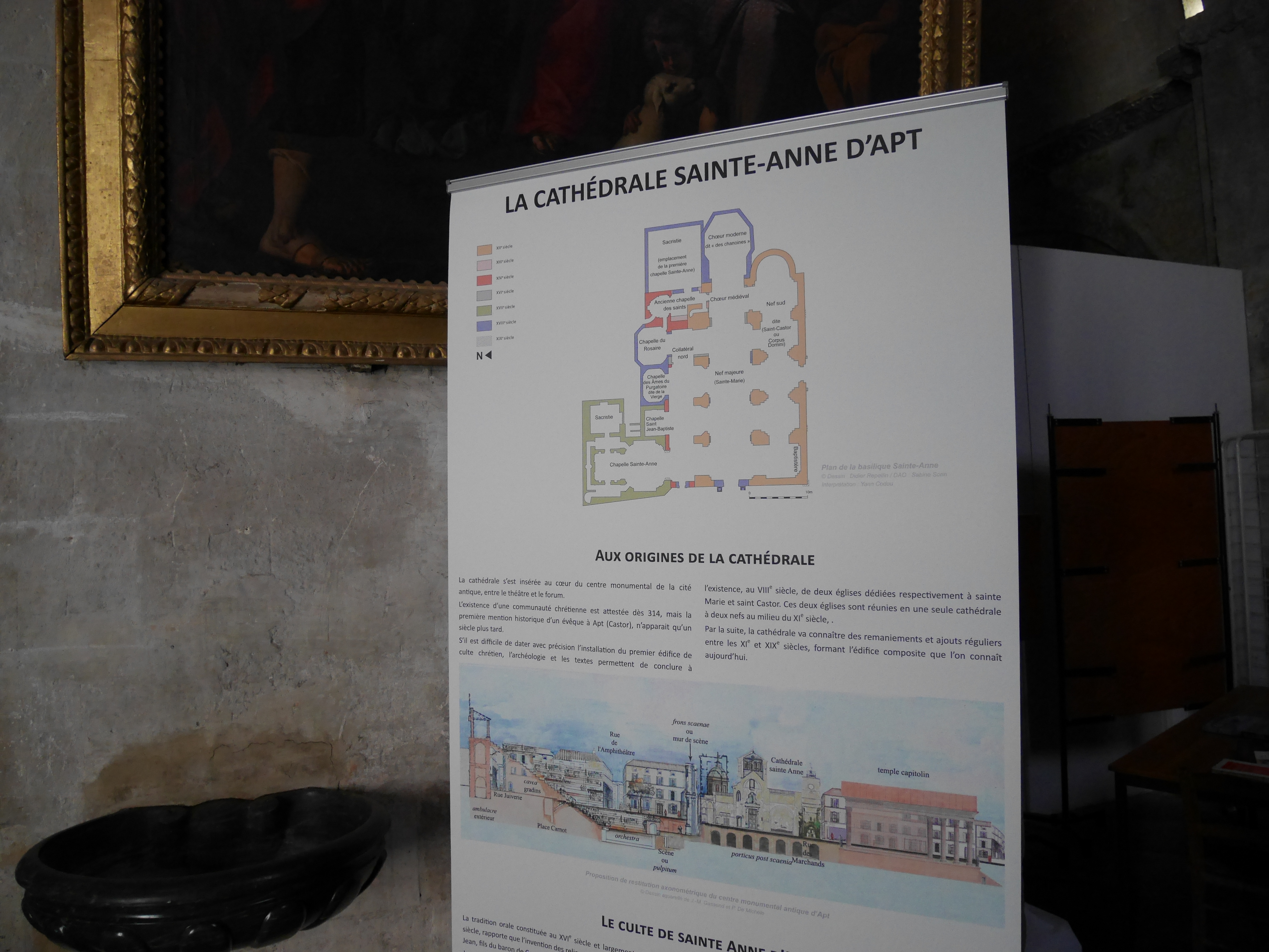 Apt - Cathédrale Ste Anne Tafel